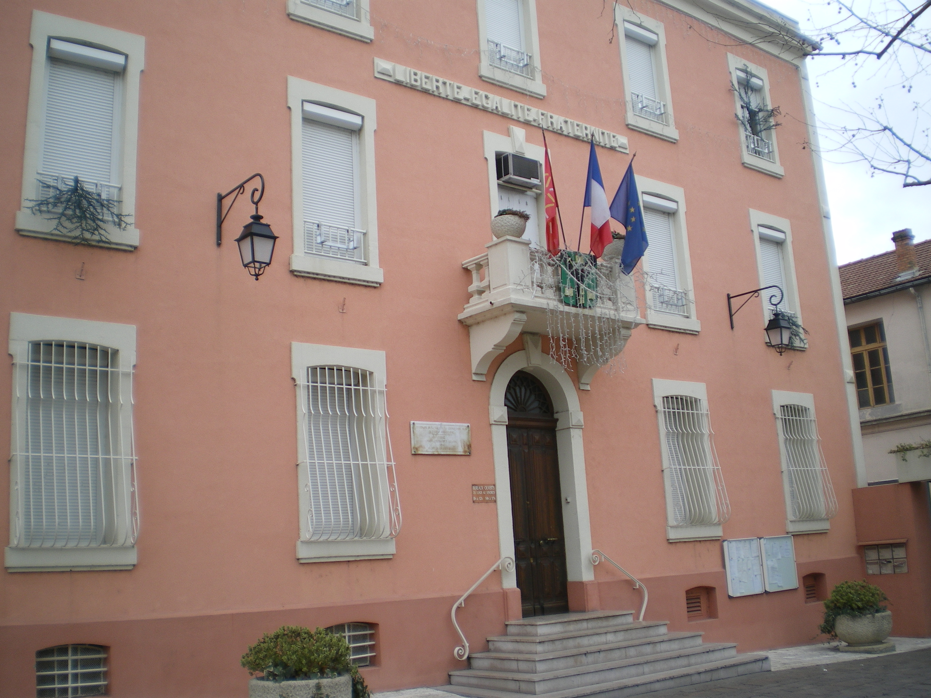 Mairie de la Grand-Combe, Gard, France